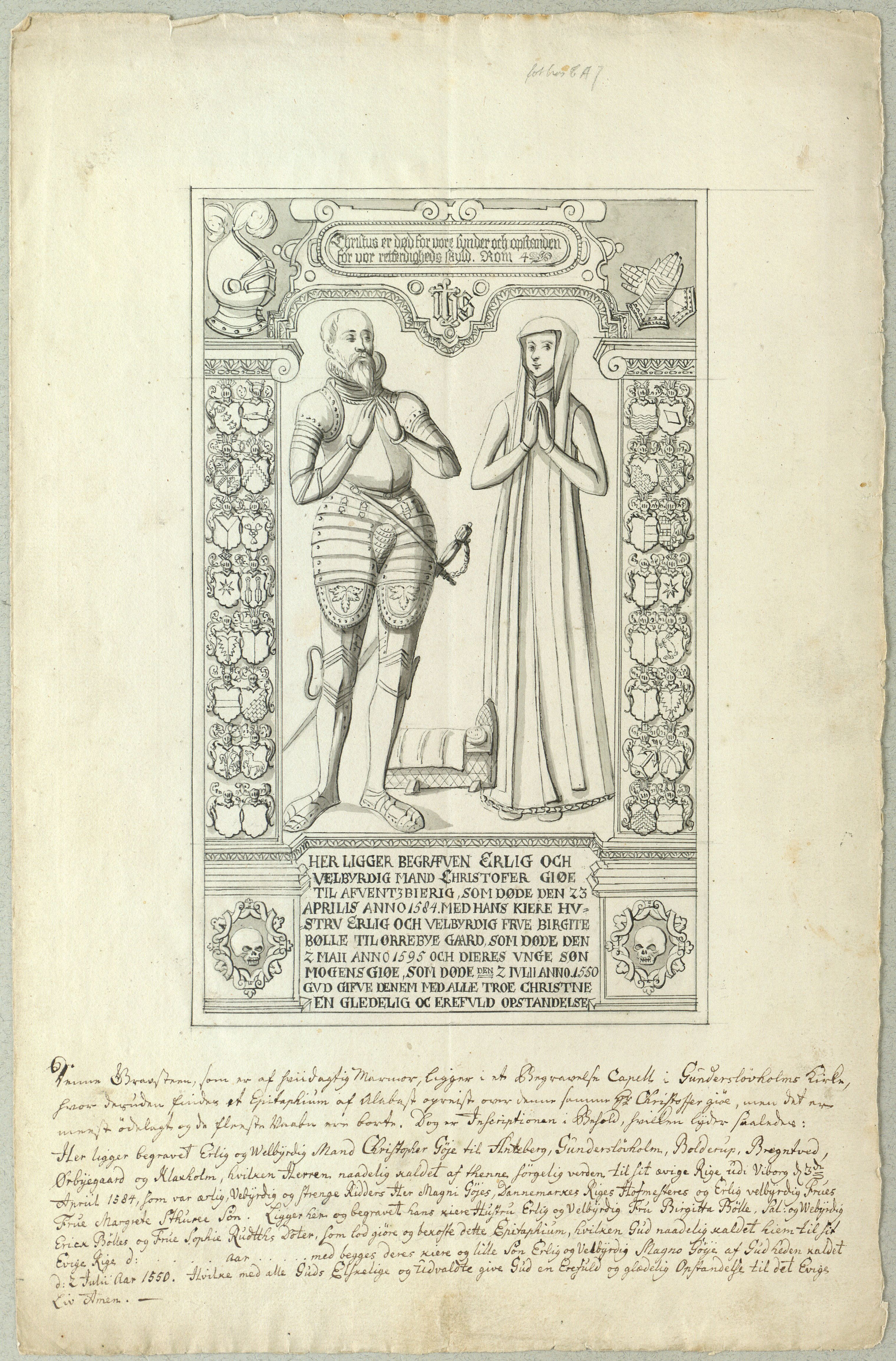 Denne Grav-Steen, som er af hviidagtig Marmor, ligger i Begravelse Capell i Gundersløvholms Kirke, hvor desuden findes et Epitaphium af Alabast opreist over denne samme Hr. Christoffer giøe, men det er meest ødelagt og de fleste Vaaben er borte. Dog er Inscriptionen i Behold, hvilken lyder saaledes: Her ligger begravet Erlig og Welbyrdig Mand Christoffer Gøje til Antzberg, Gundersløvholm, Bolderup, Bregntved, Ørbyegaard og Klausholm, hvilken Herren naadelig kaldet af thenne sørgelig verden til sit evige Rige udi Viborg d. 3de April 1584, som var ærlig, Velbyrdig og strenge Ridders Her Magni Gøjes, Dannemarks Riges Hofmesters og Erlig velbyrdig Frues Frue Margrete Sthures Søn. Ligger her og begravet hans kiere Hustru Erlig og Velbyrdig Fru Birgitte Bølle, Sal: og We[l]byrdig Ericks Bølles og Frue Sophie Rudtths Doter, som lod giøre og bekoste dette Epitaphium, hvilken Gud naadelig kaldet hiem til sit Evige Rige d:..... aar..... med begges deres kiere og lille Søn Erlig og Velbyrdig Magno Gøye af Gud heden kaldet d: 2 Julii Aar 1550. Hvilke med alle Guds Elskelige og udvaldte give Gud en Erefuld og glædelig Opstandelse til det Evige Liv Amen. 25 x 38 cm.